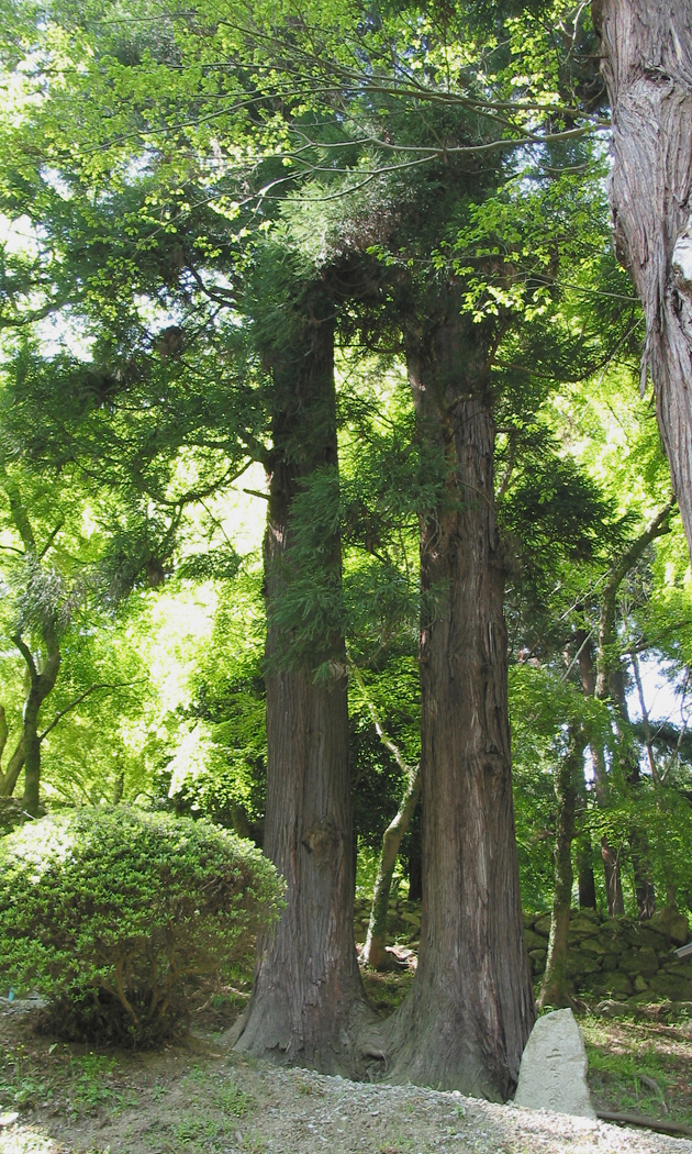 Futamoto-no-Sugi of Buzan Hasedera at Sakurai, Nara, Japan. 真言宗豊山派総本山長谷寺にある二本の杉（ふたもとのすぎ） 奈良県桜井市初瀬で撮影